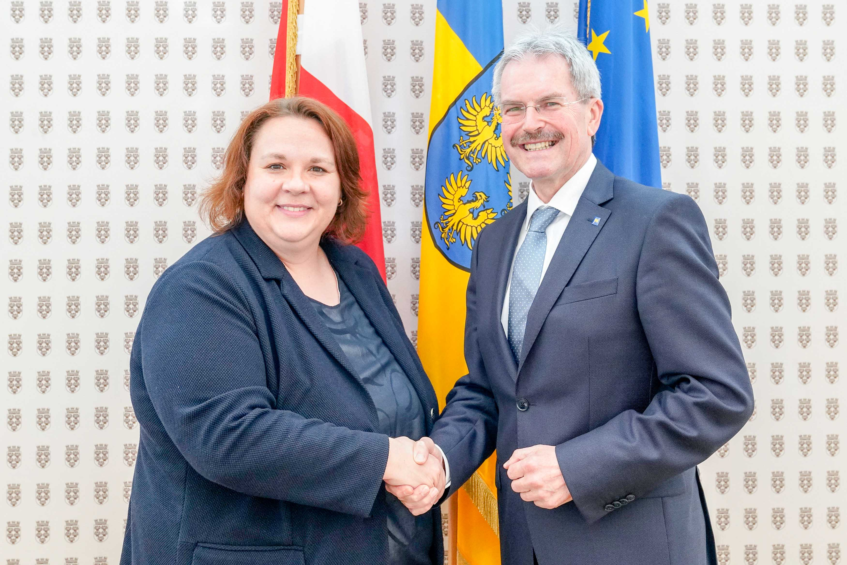 Landtagspräsident Karl Wilfing führt die Konstituierung der Landtags-Ausschüsse durch. Am Foto: Präsident Wilfing gratuliert LAbg Kathrin Schindele zur Wahl als Obmann des Bildungs-Ausschusses